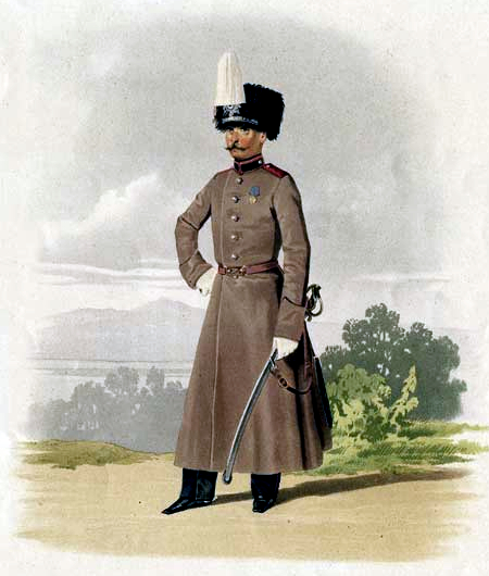 Рядовой Л.-Гв. Гродненского Гусарского полка, 20 октября 1856.